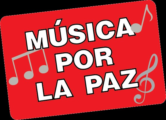 Logo de Música por la Paz